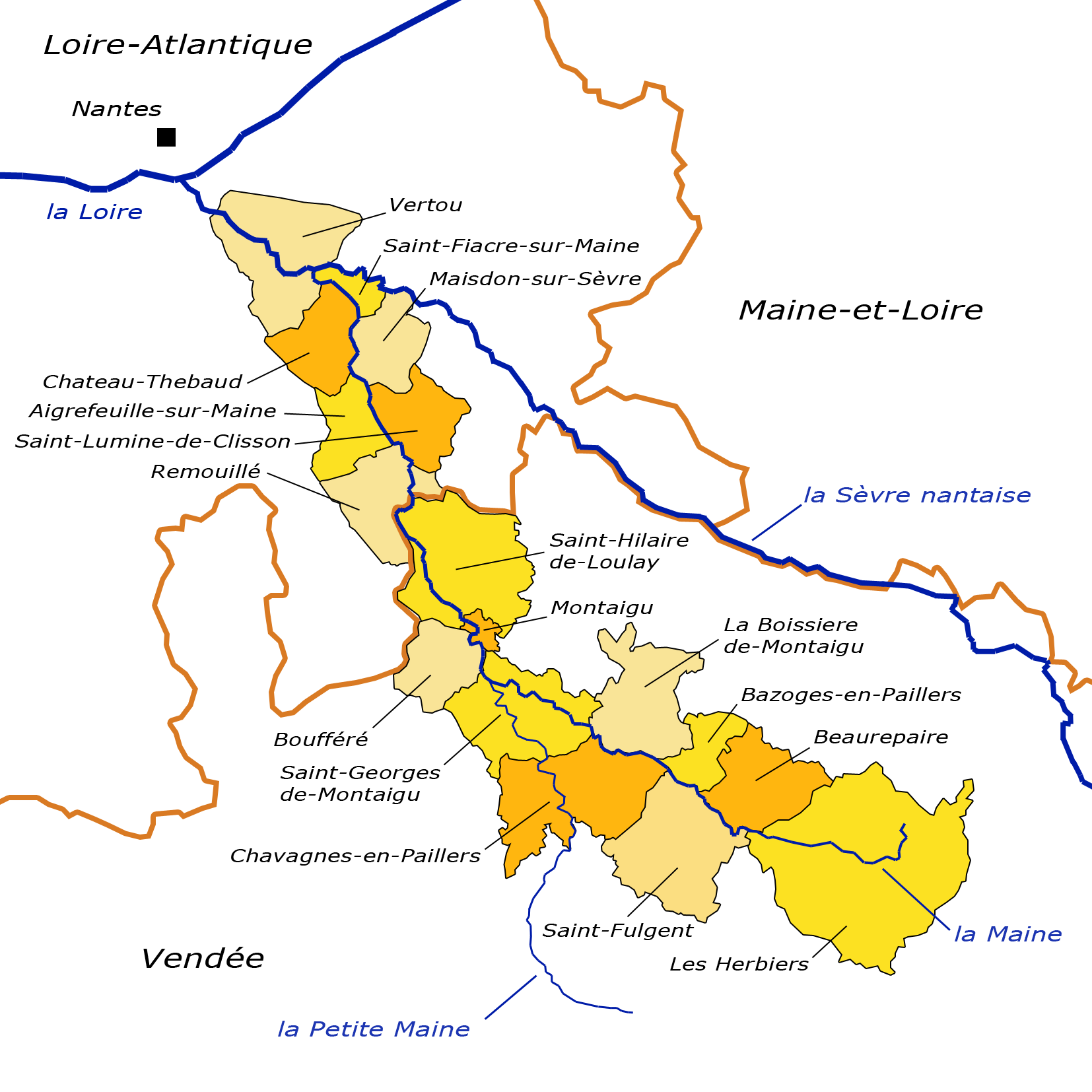 Carte de la rivière la Maine (Loire-Atlantique/Vendée)